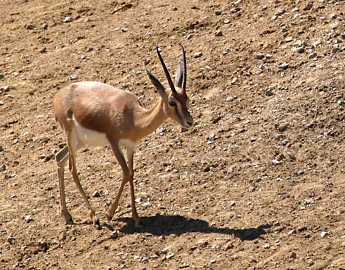 Dorkasgazelle(gazella dorkas)Zoo Hannover